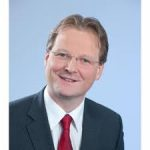 Gemeindevorstandsvorsitzender Robert Görger-St.Jörgen